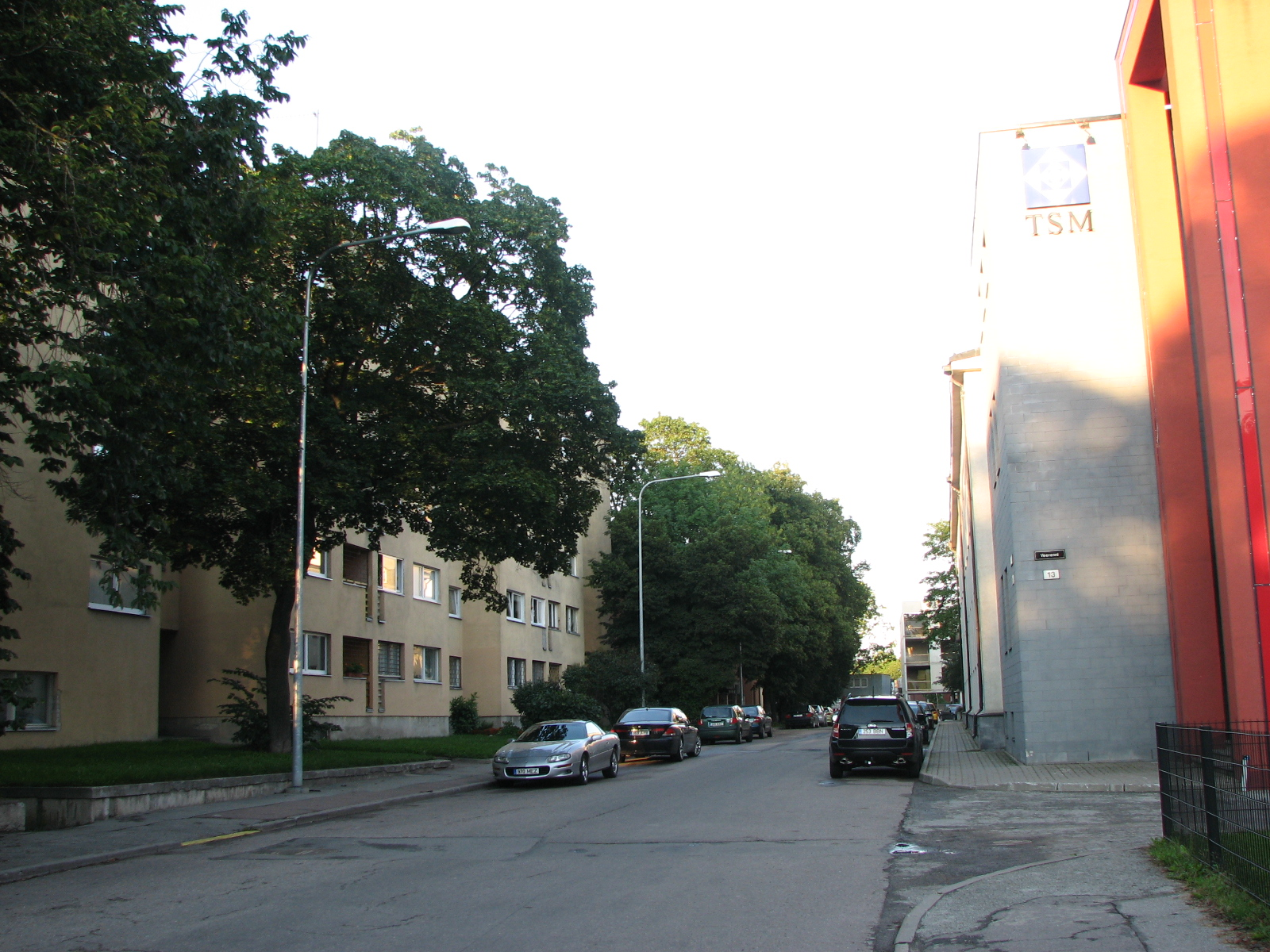 Vaade Uus-Tatari tänavale Veerenni tänavalt